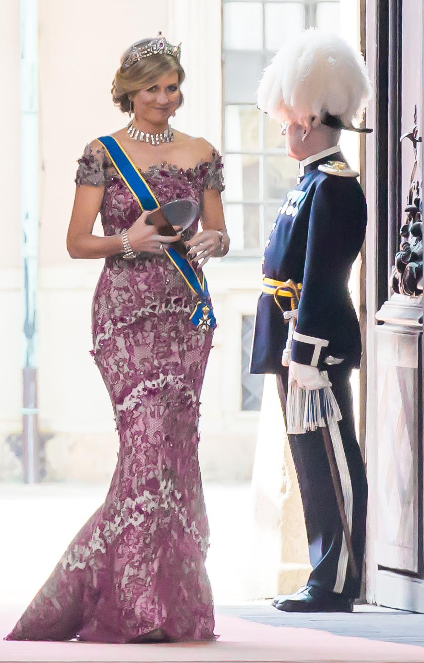 Queen Máxima of the Netherlands in 2015.jpg.